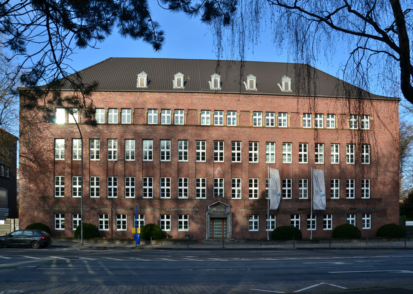 Verwaltungsgebäude Ruhrverband in Essen, unter Denkmalschutz